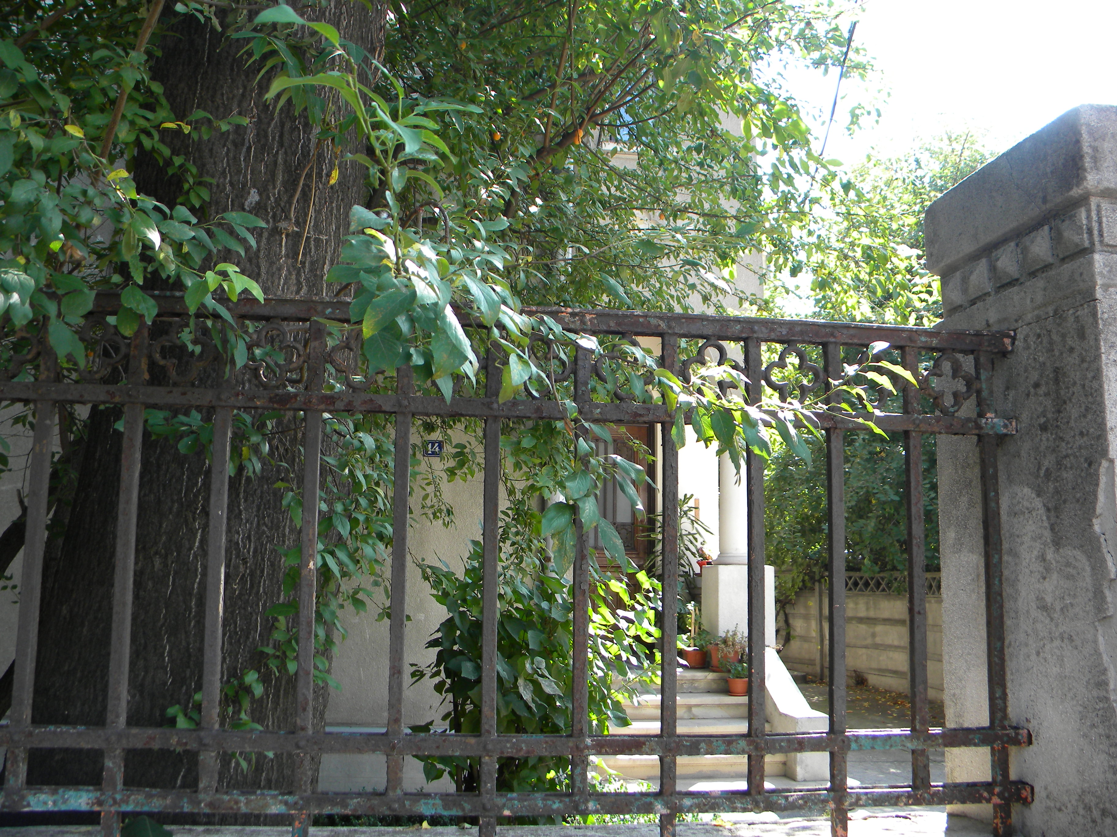 Casa pe Str. Dumbrava Rosie nr. 14, Bucuresti sect. 2; (detaliu 2)